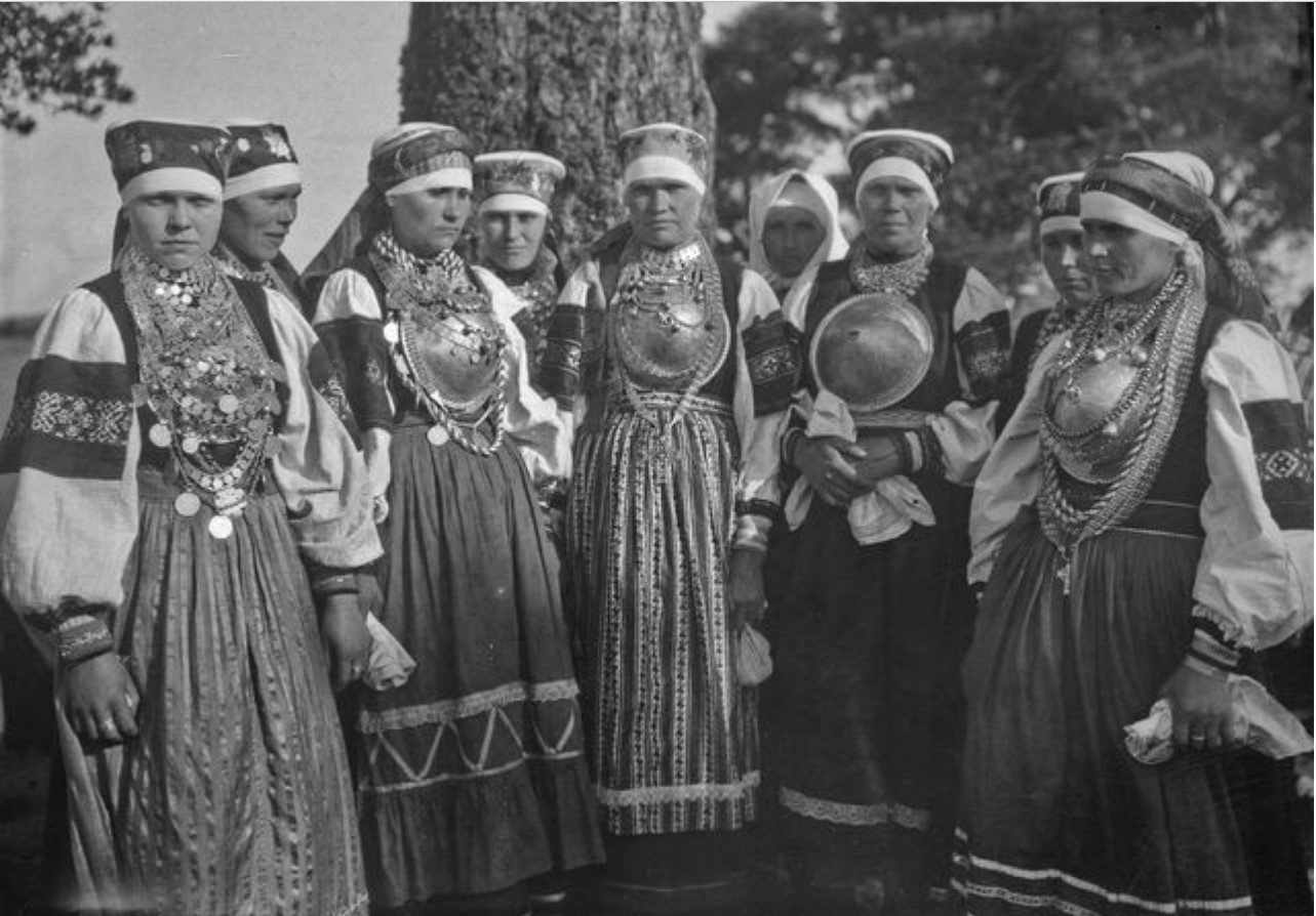 Село Верхоустье, Российская империя. Свадьба